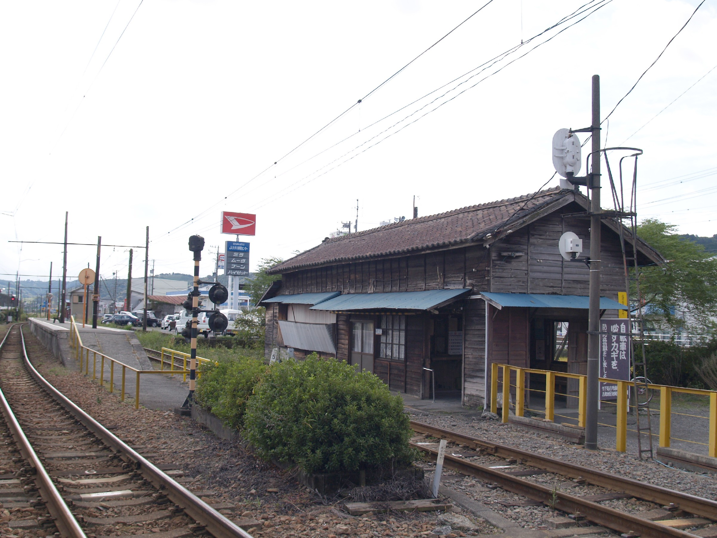 五和駅